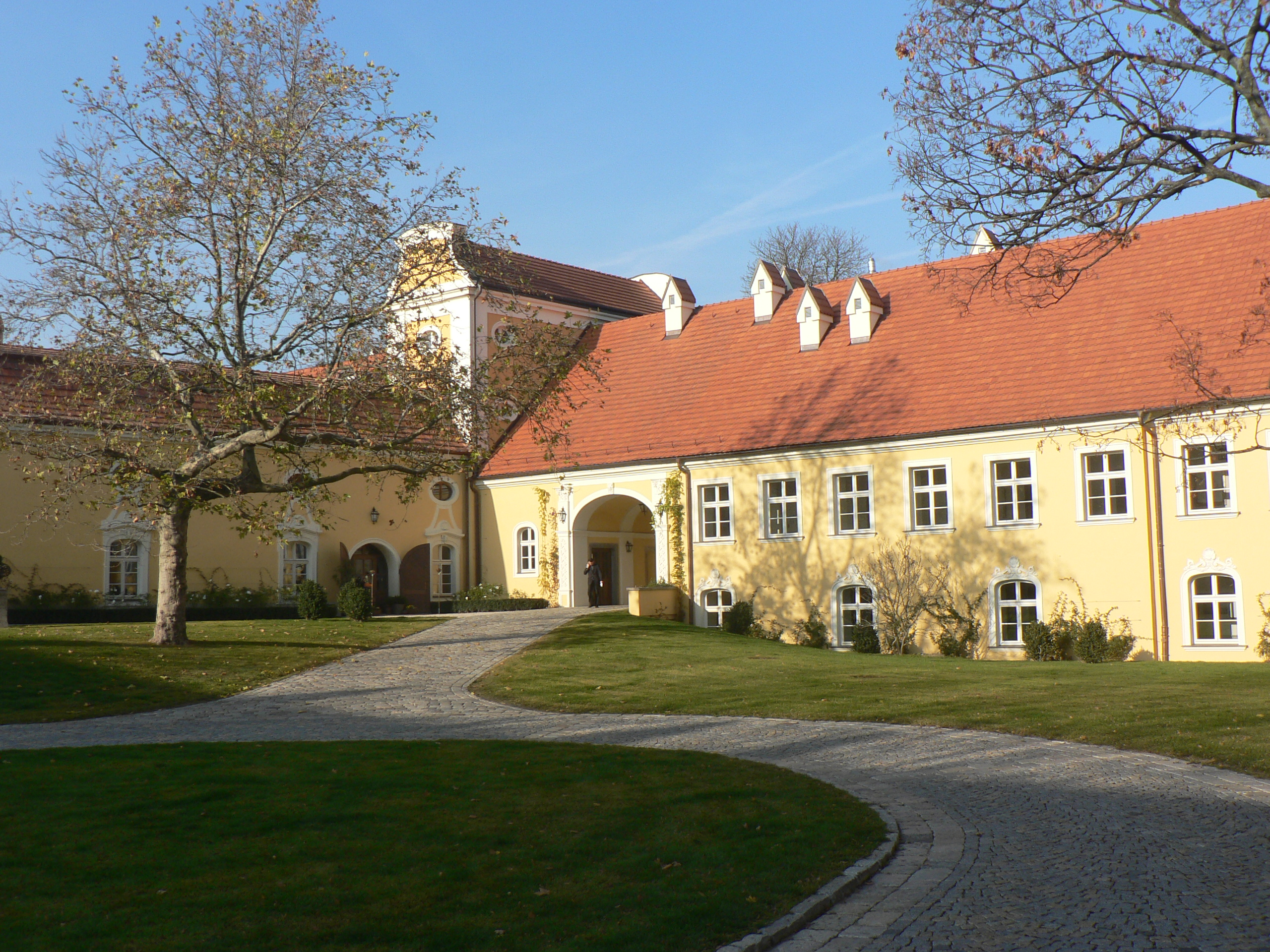 Château Béla – A bélai barokk kastély (Szlovákia)